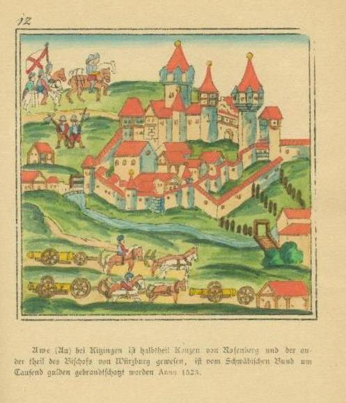 Holzschnitt von Joseph Baader